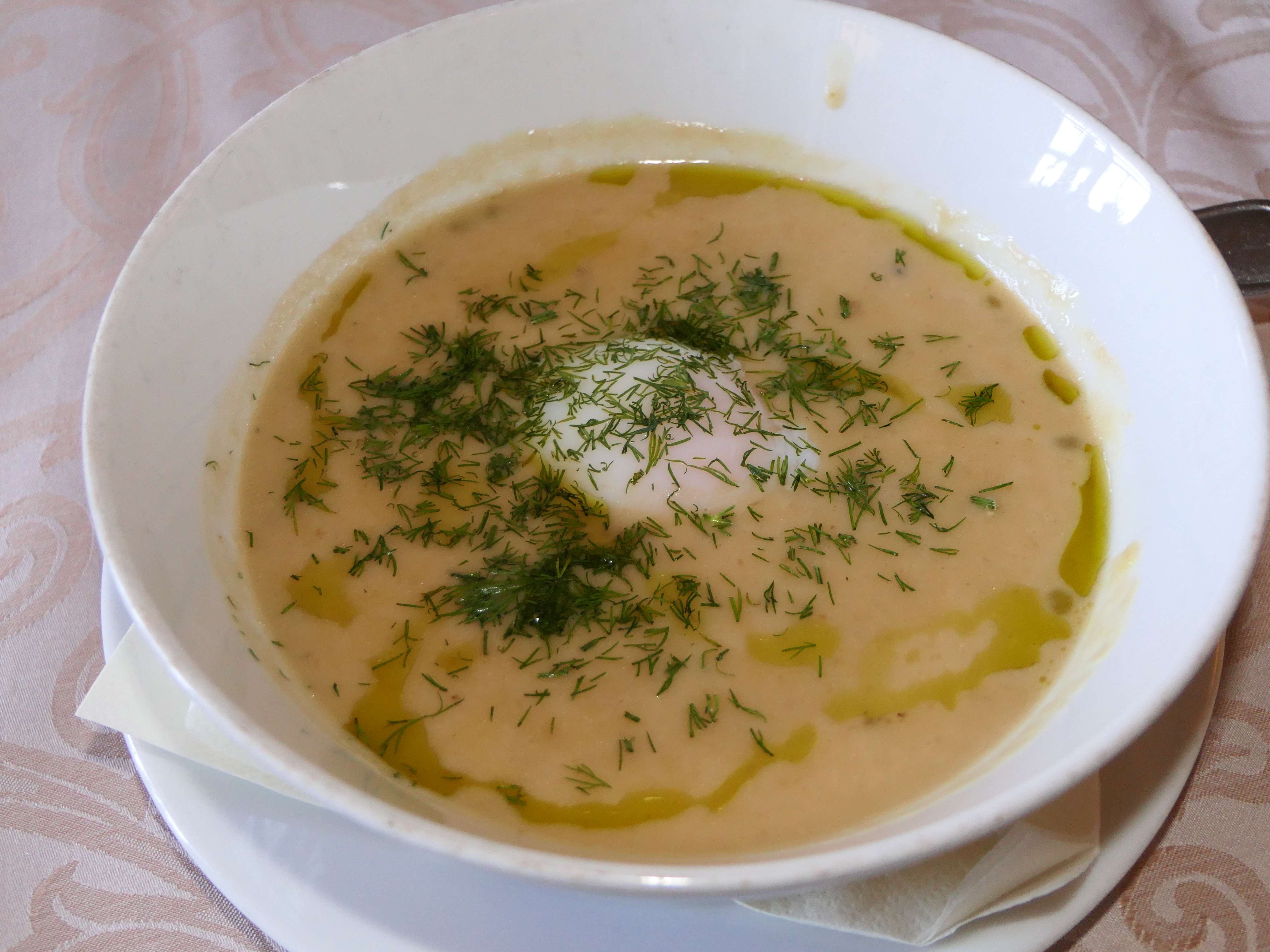 Kulajda - Tschechische Suppe, Hotel Vetruse, Usti nad Labem